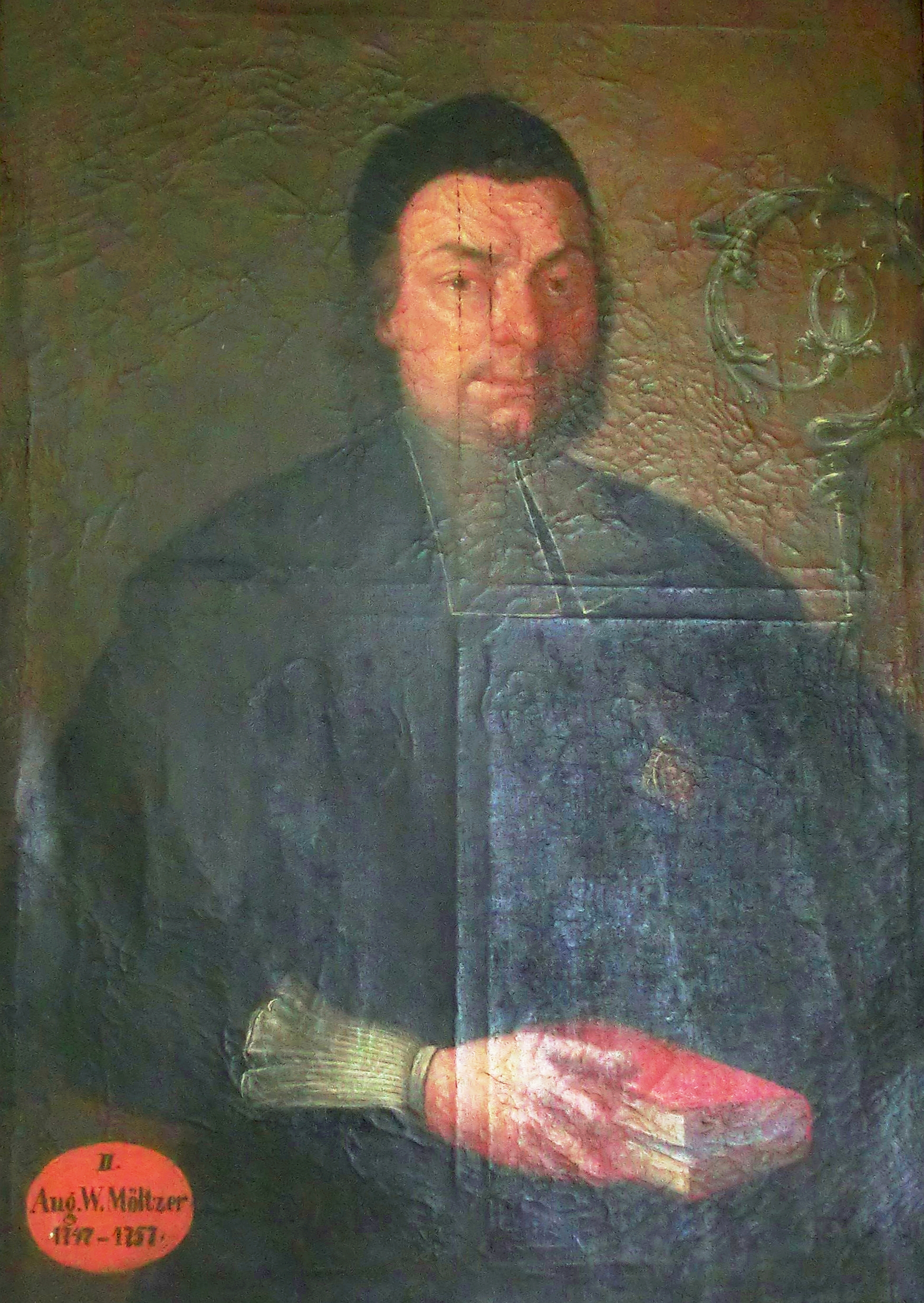 1757 Augustin Václav Möltzer, 2. infulovaný arciděkan v Horní Polici.